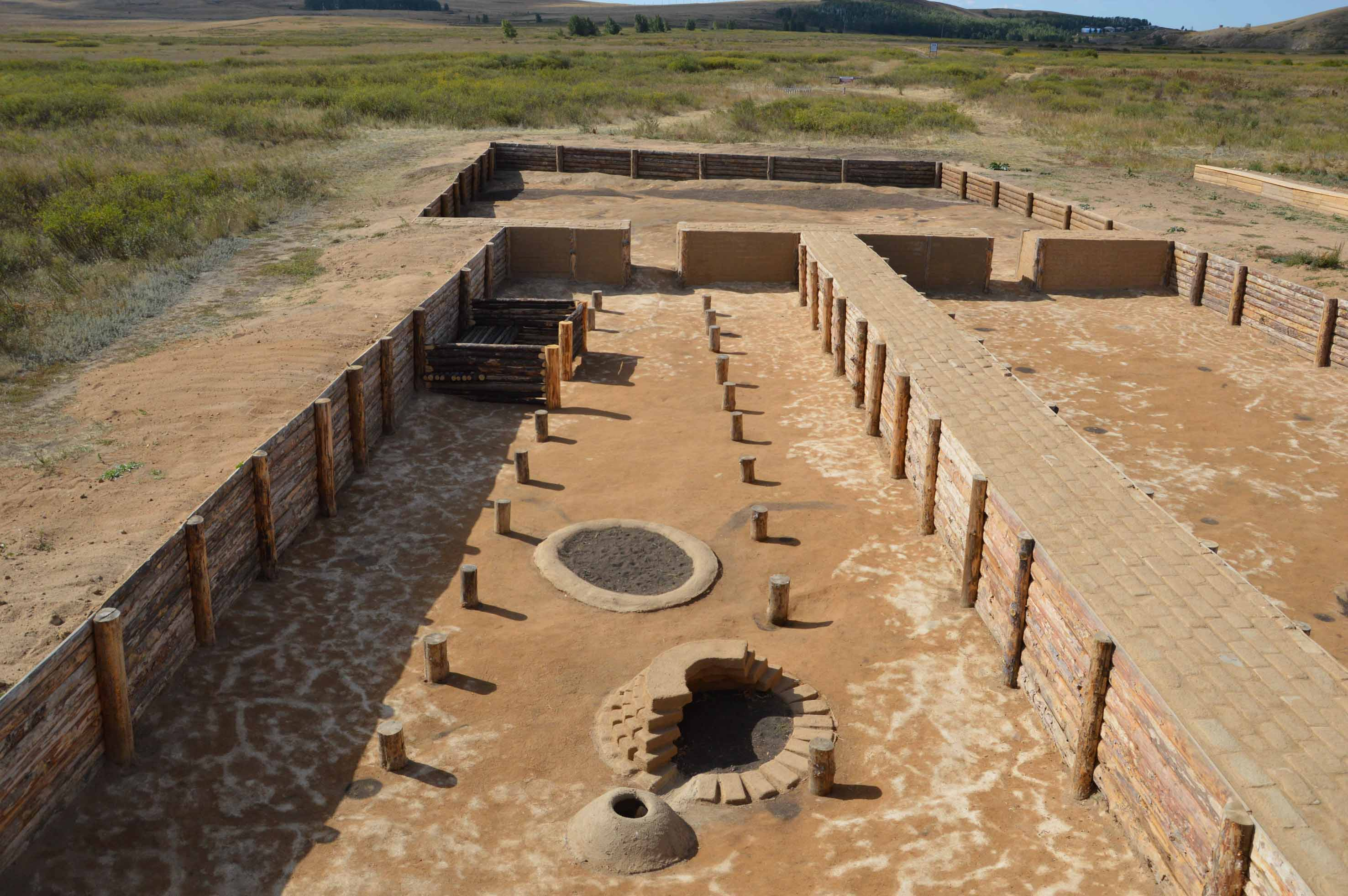 Городище "Аркаим": 10 км северо-западнее поселка, левый берег р.Большая Караганка, Амур, Брединский район, Челябинская область